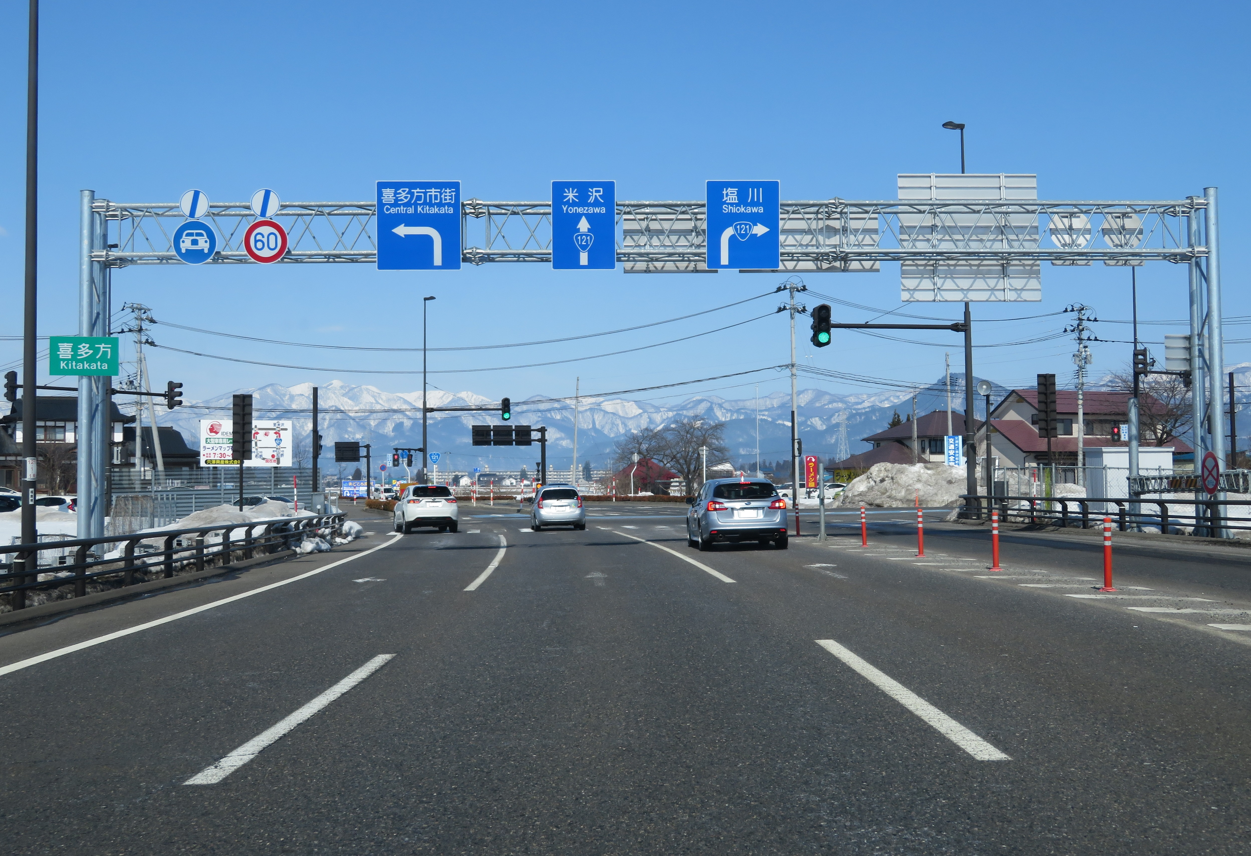 会津縦貫道喜多方ＩＣ出入口付近